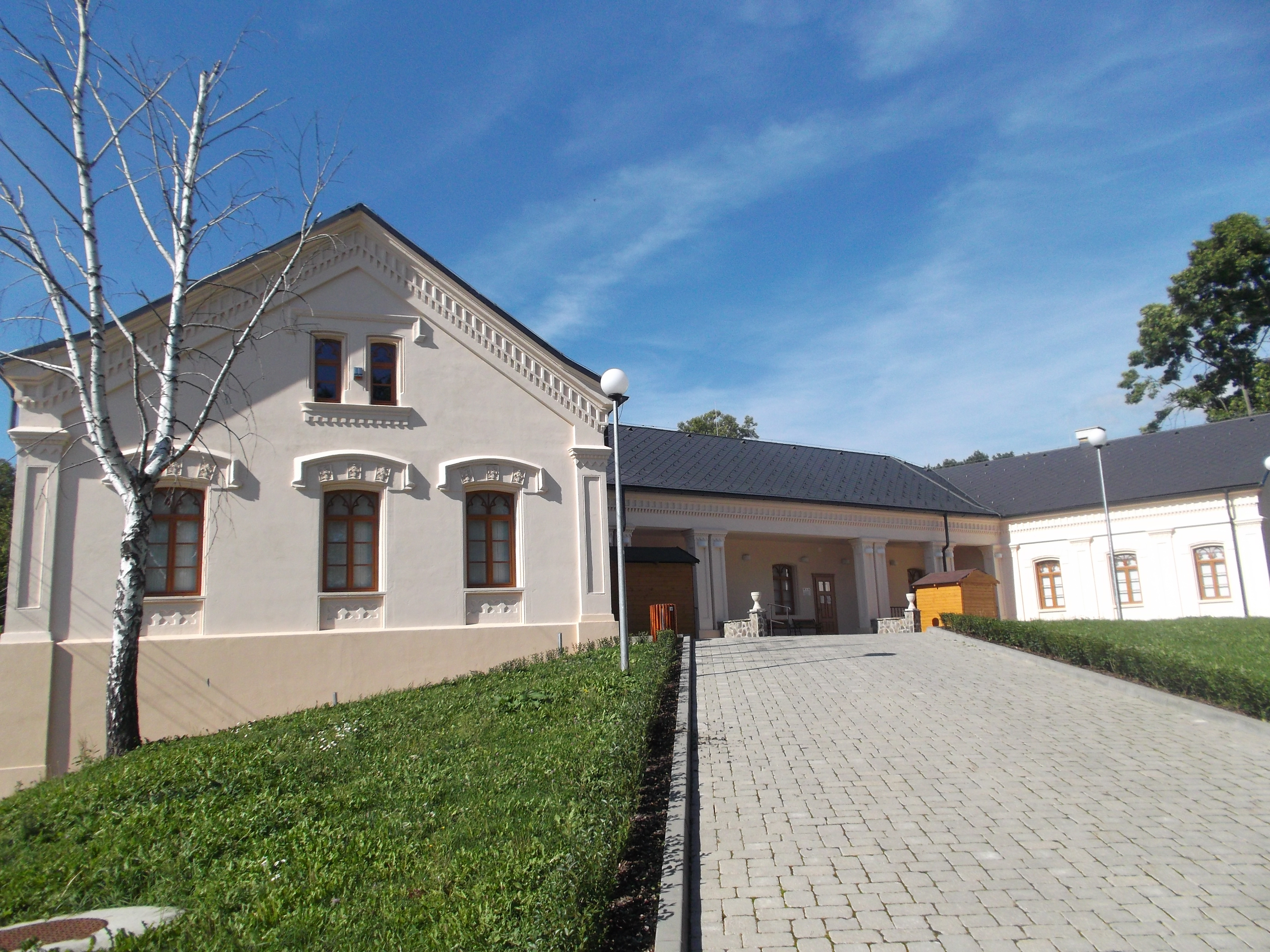 Kaštieľ